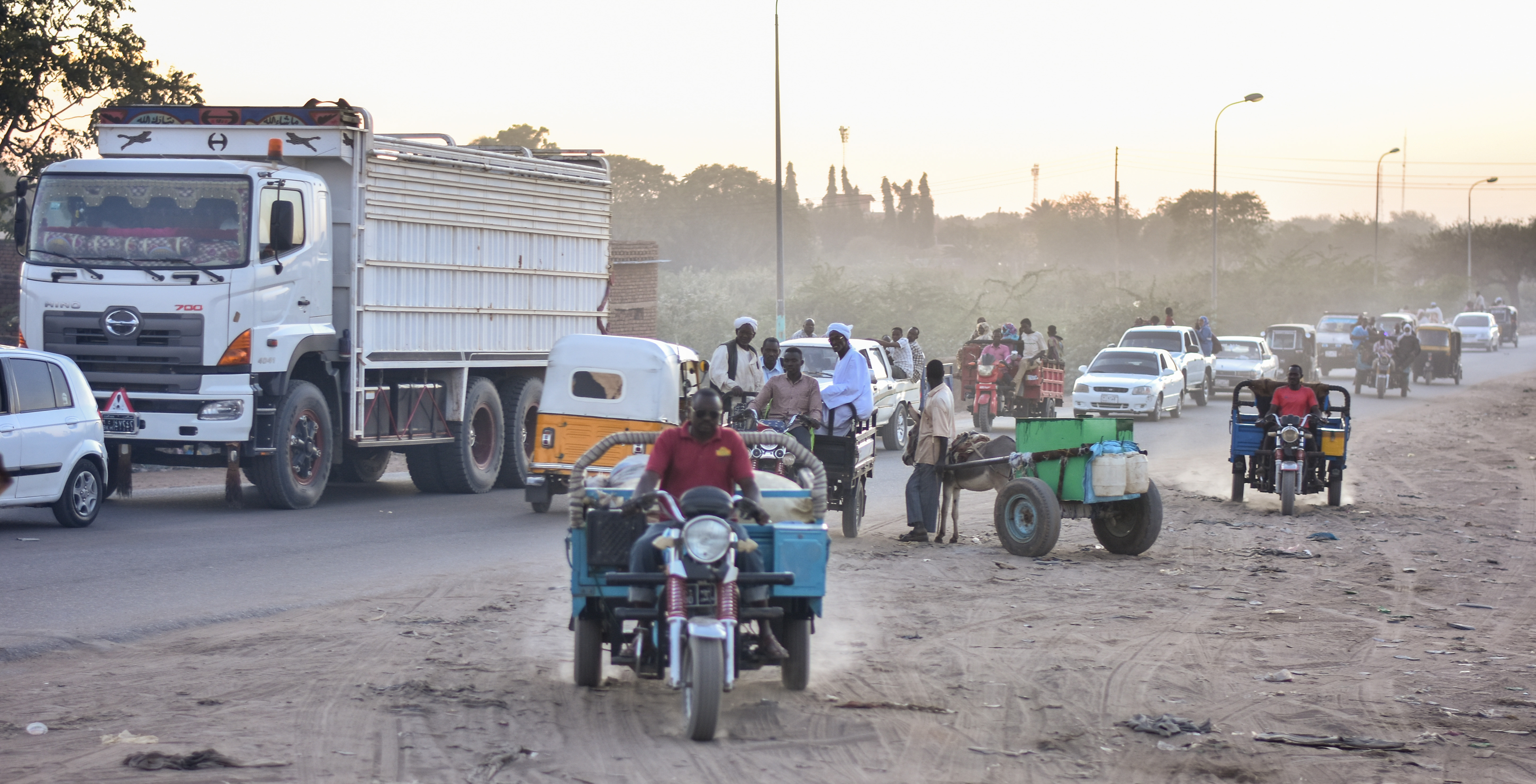 WLASudan2020 This is an image with the theme "Africa on the Move or Transport" from: Sudan السودان . ولاية جنوب دارفور .نيالا . شارع الضعين